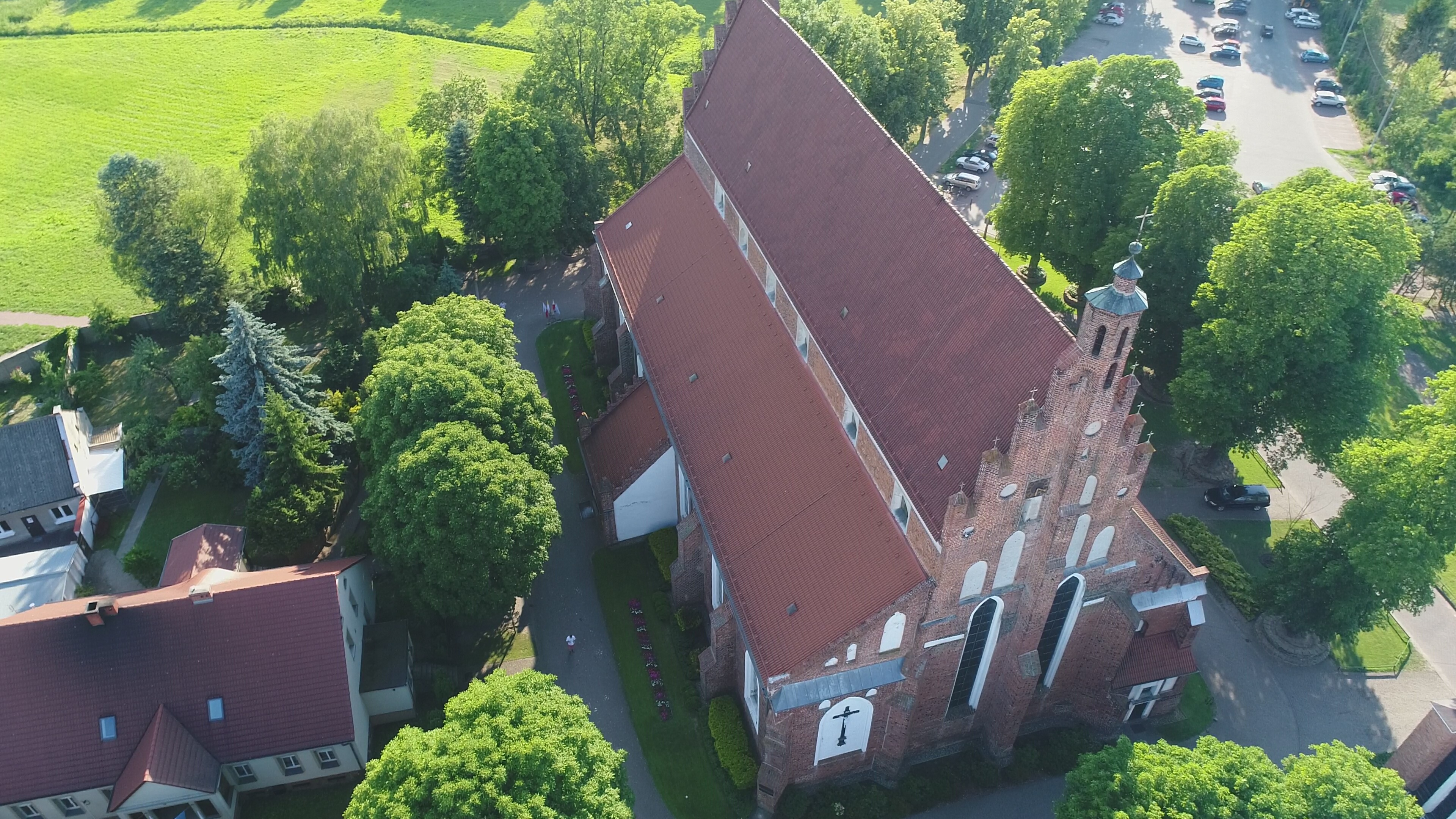 Widok z góry